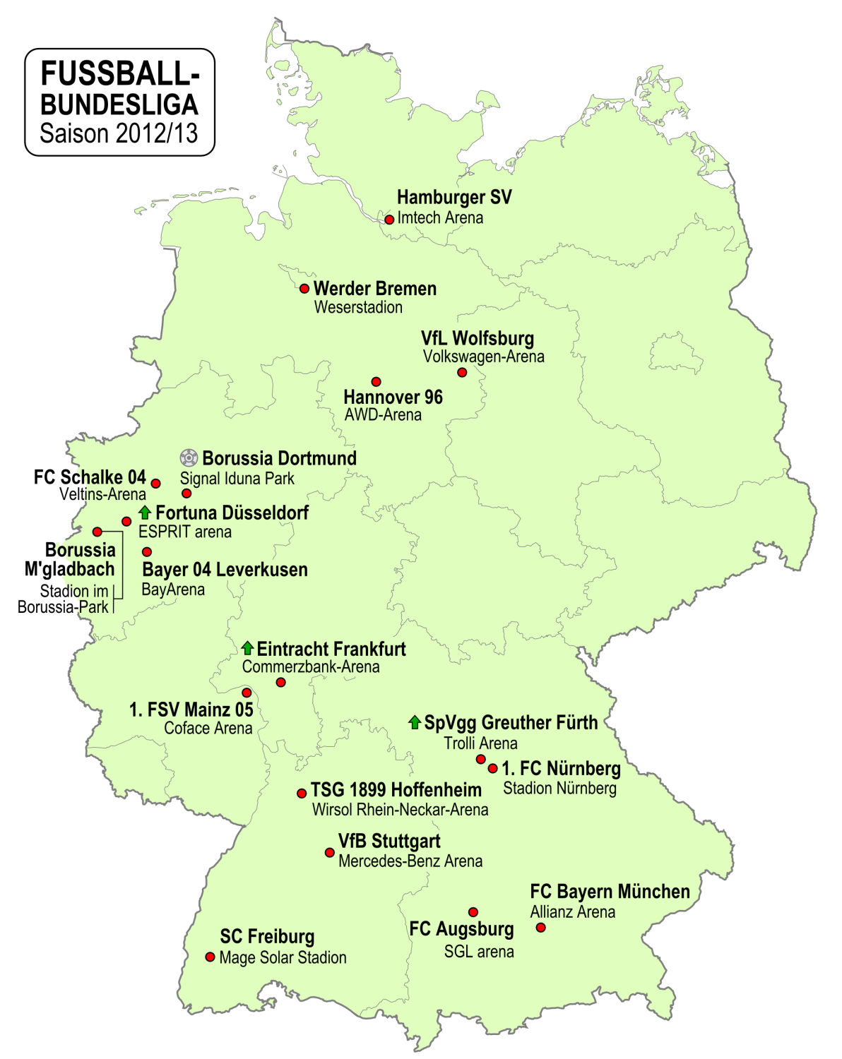 Karte der Vereine der Fußball-Bundesliga-Saison 2012/2013